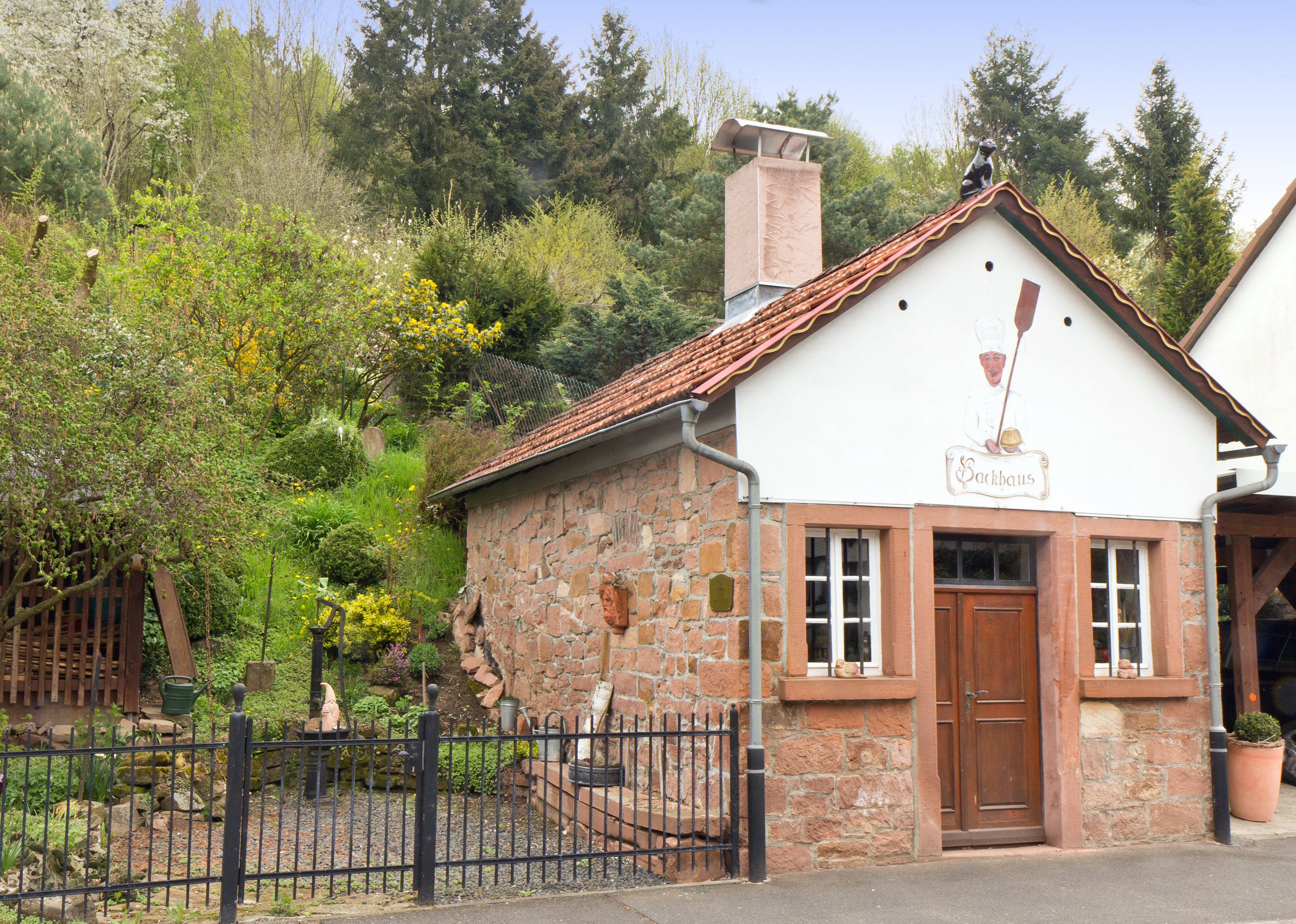 Gemeindebackhaus in Ortsteil Gettenbach, Gemeinde Gründau im Main-Kinzig-Kreis in Hessen. Erbaut um 1840. Als Gemeindebackhaus bis 1947 genutzt.